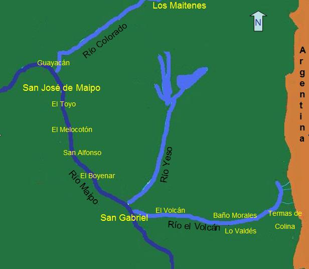 Principales localidades del Cajón del Maipo (Chile)